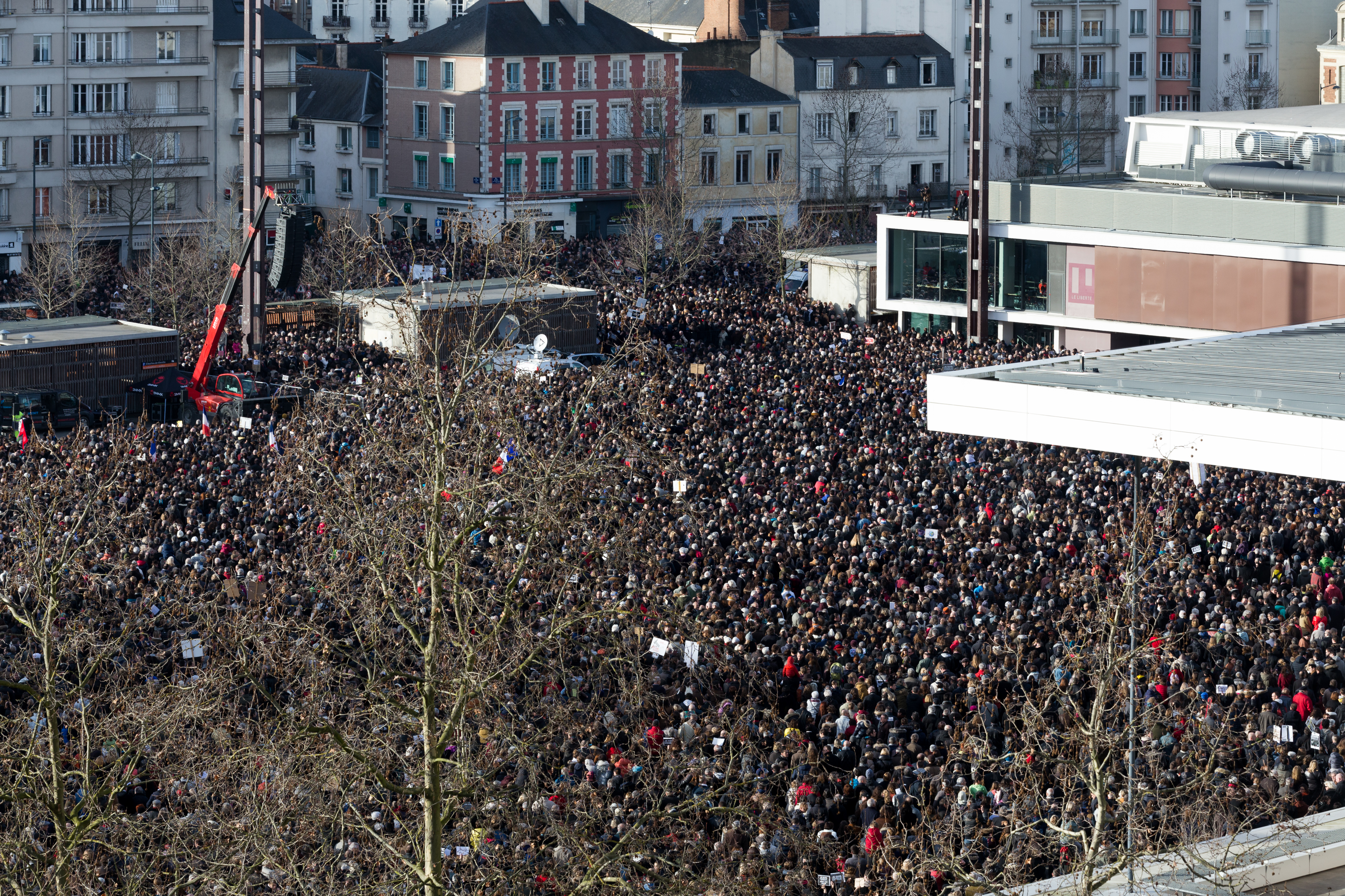 Marche républicaine du 11 janvier 2015 à Rennes.